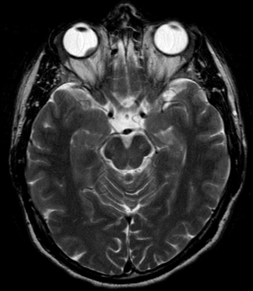 Aderhautmelanom in der Kernspintomographie T2 axial